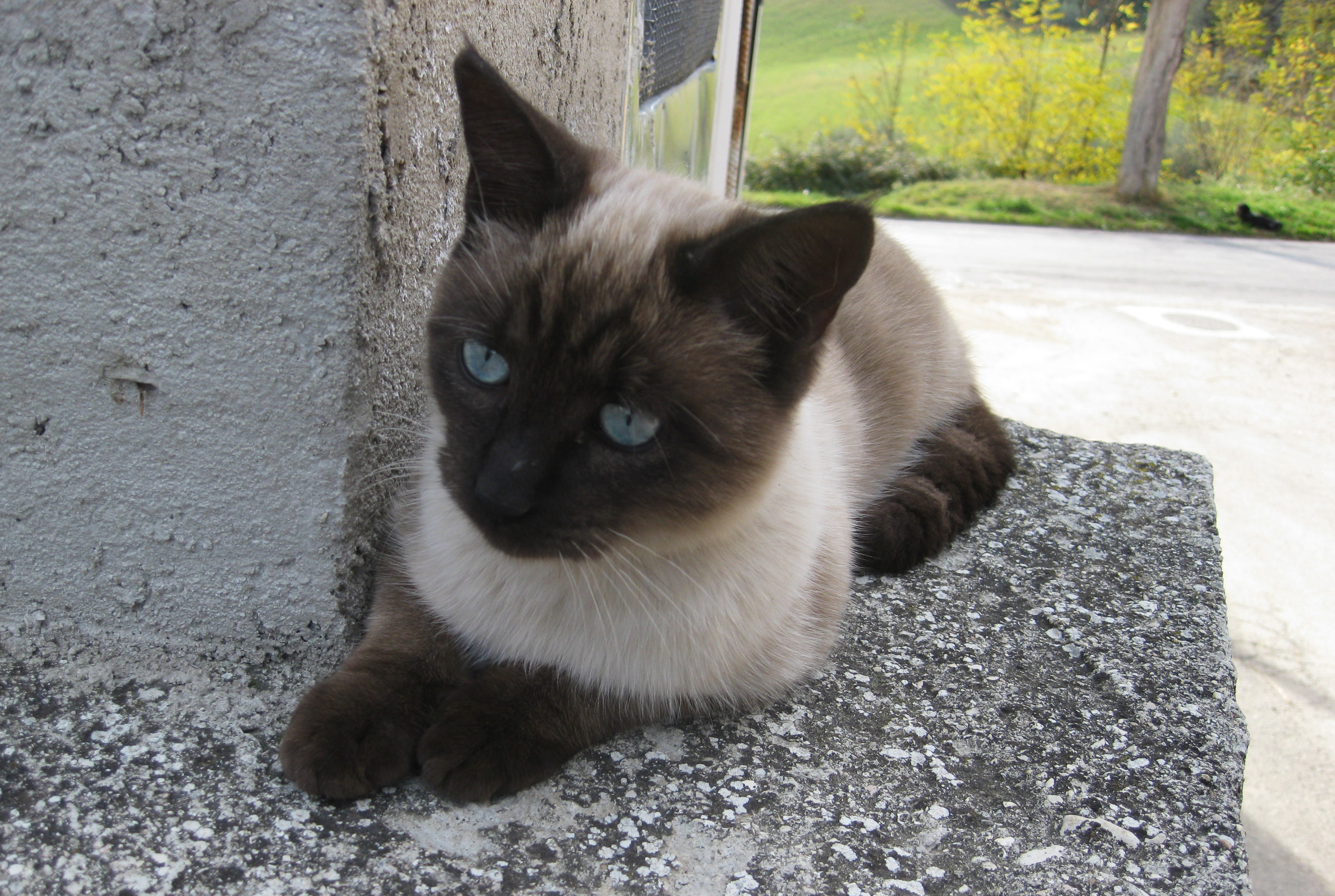 gatto siamese a pelo corto di nome Mini